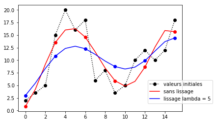 Influence du lissage de paramètres